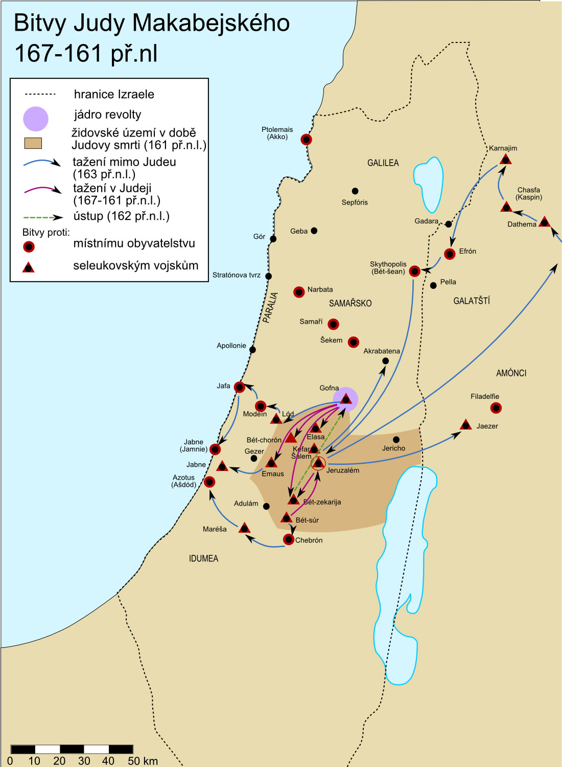 Bitvy Judy Makabejského (167-161 př.n.l.), Battles of Judah Maccabee (167-161 BC)